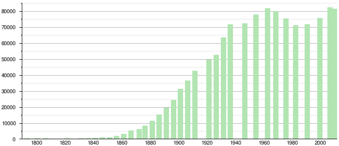 中文（中国大陆）: 塞纳河畔阿涅勒人口变化数据